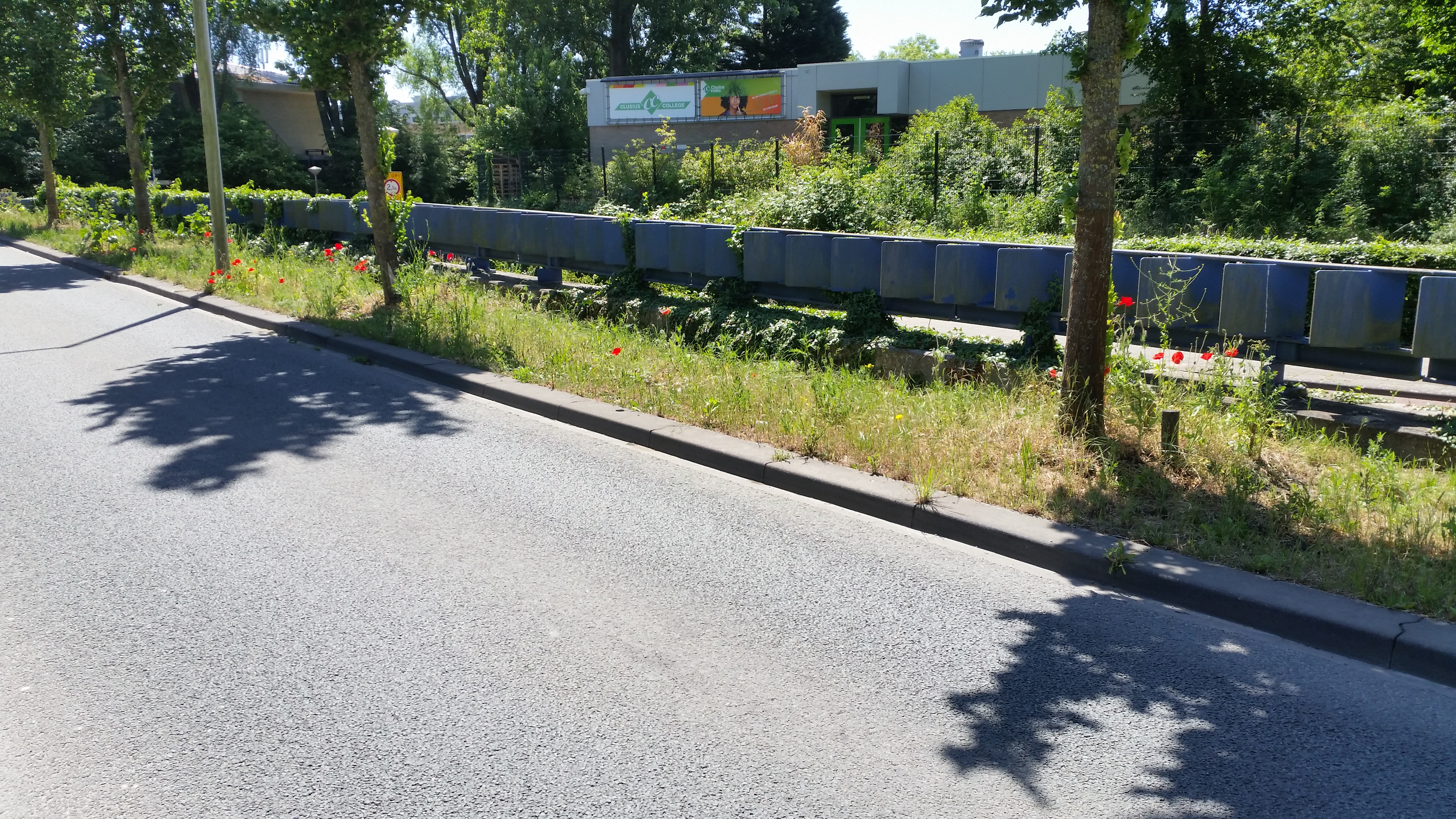 Impressie van brug 934 in de Nieuwe Purmerweg, Amsterdam-Noord